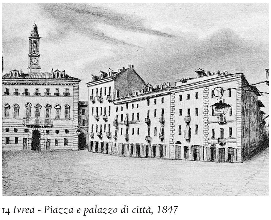 Disegno della piazza di Ivrea e del palazzo di città, 1847